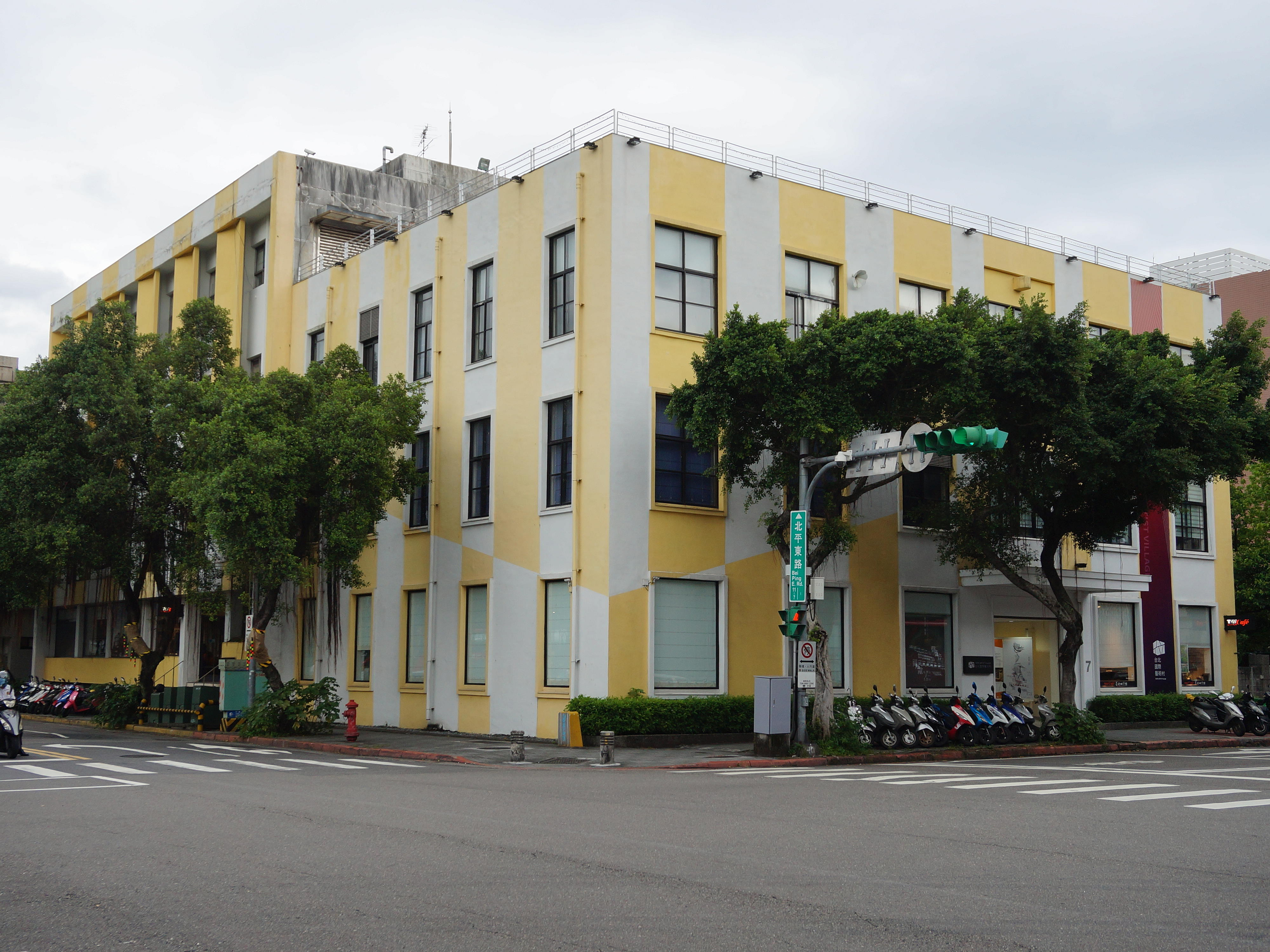 台北國際藝術村，地址：臺北市中正區北平東路7號。